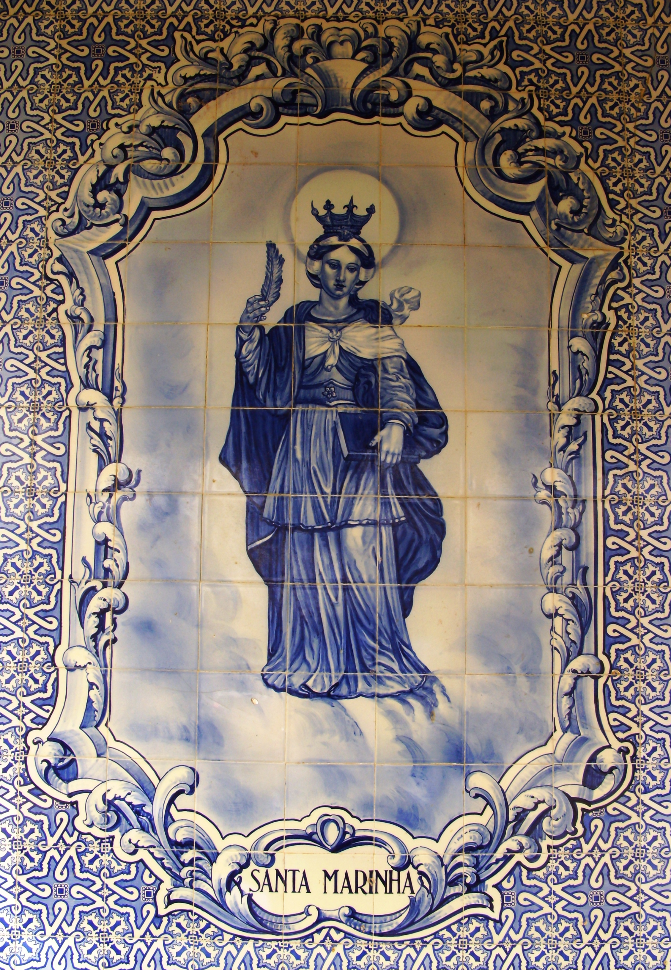 Capela de Nossa Senhora de Nazaré, praia de Cortegaça, concelho de Ovar, distrito de Aveiro, Portugal: painel de azulejos na fachada representando Santa Marinha.